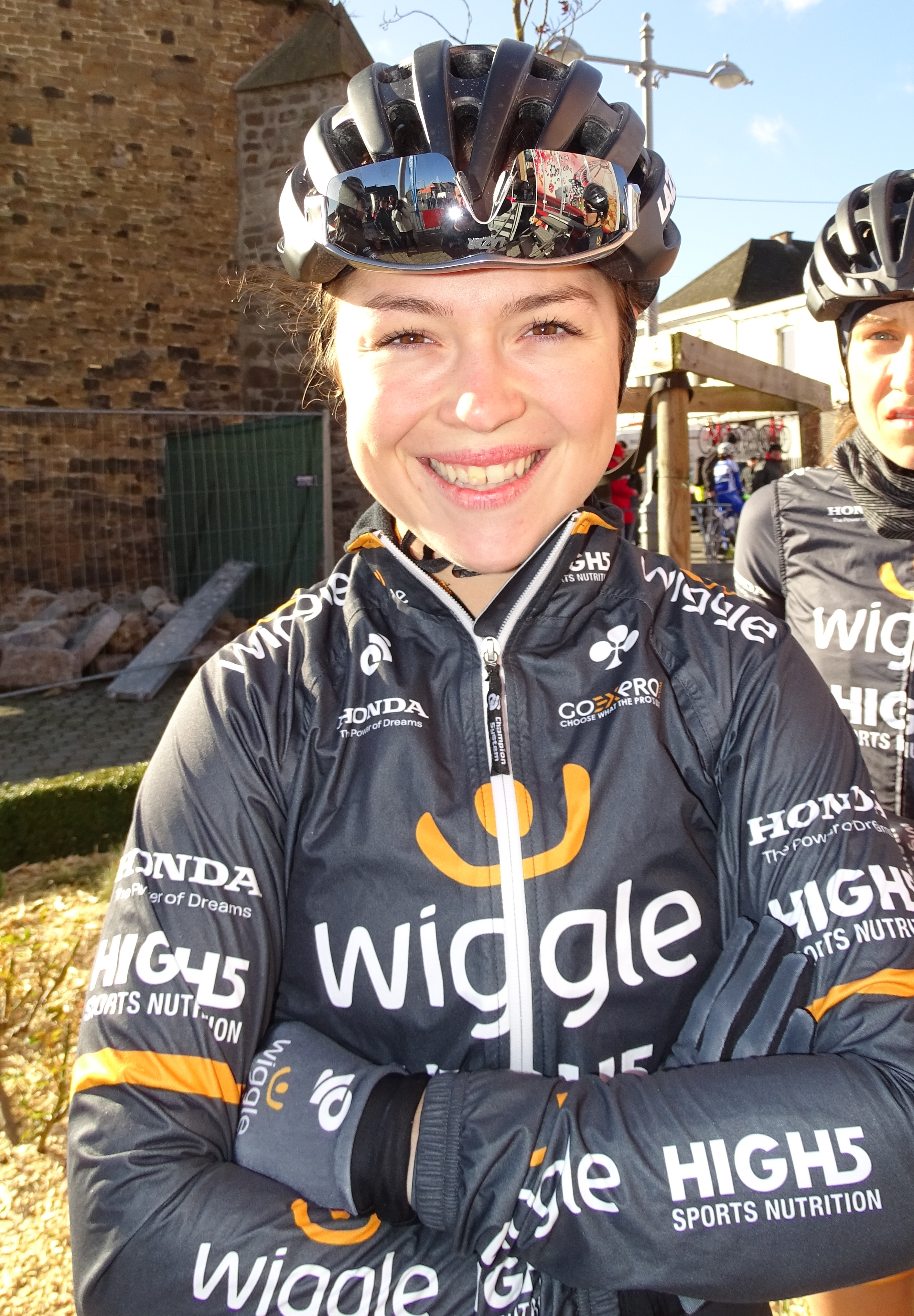 Reportage réalisé le mercredi 2 mars à l'occasion du départ du Samyn des Dames 2016 et du Samyn 2016 à Quaregnon, Belgique.